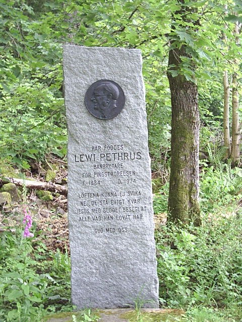 Minnessten rest på Lewi Pethrus födelseplats i Vargön på Hallebergs sluttning.